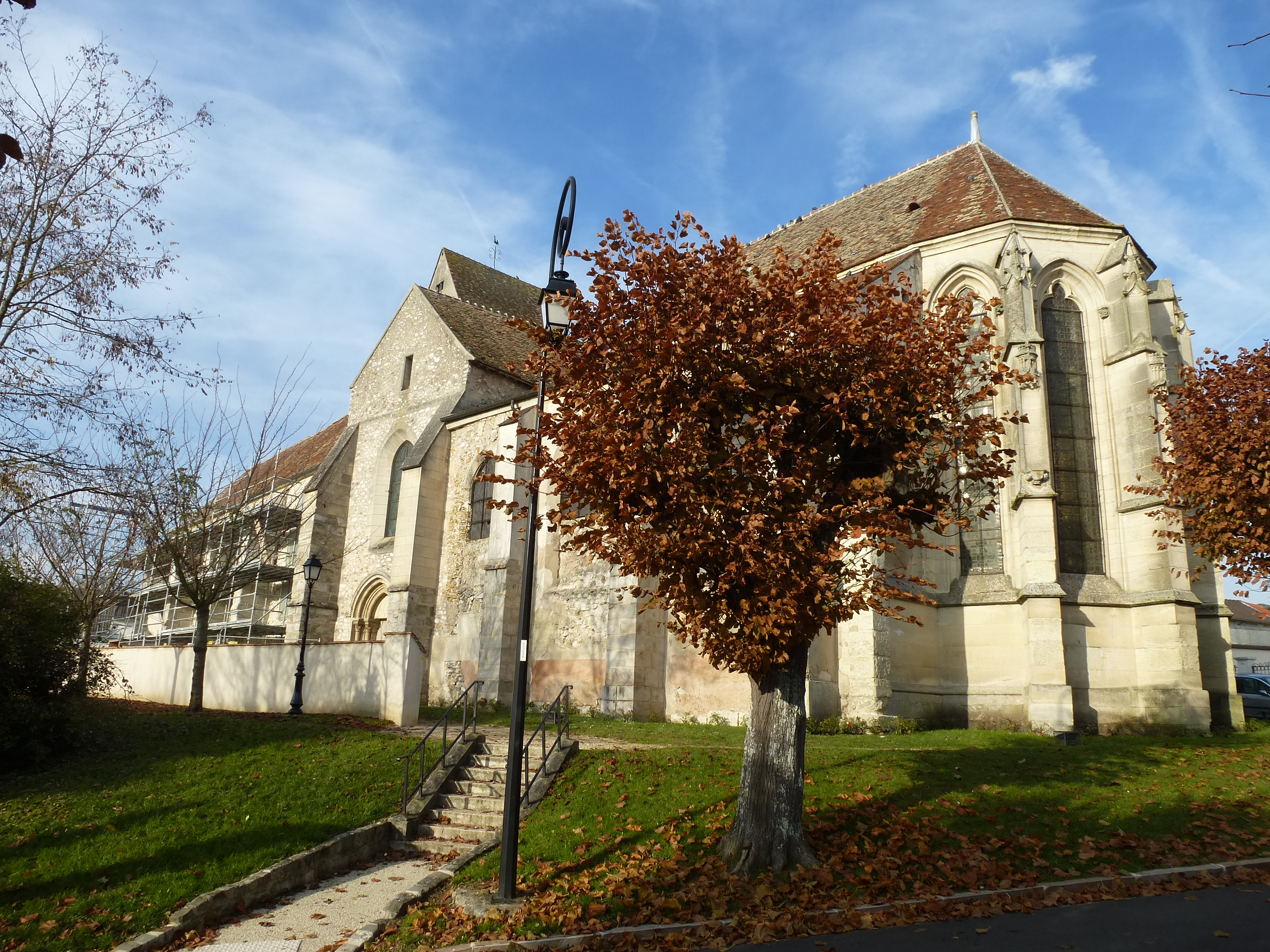 Église Saint-Georges de Couilly-Pont-aux-Dames. (Seine-et-Marne, région Île-de-France).